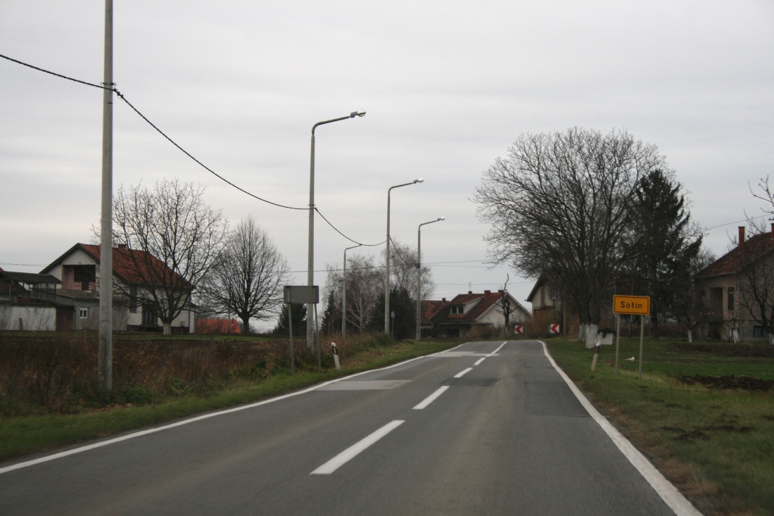 Ulaz u Sotin